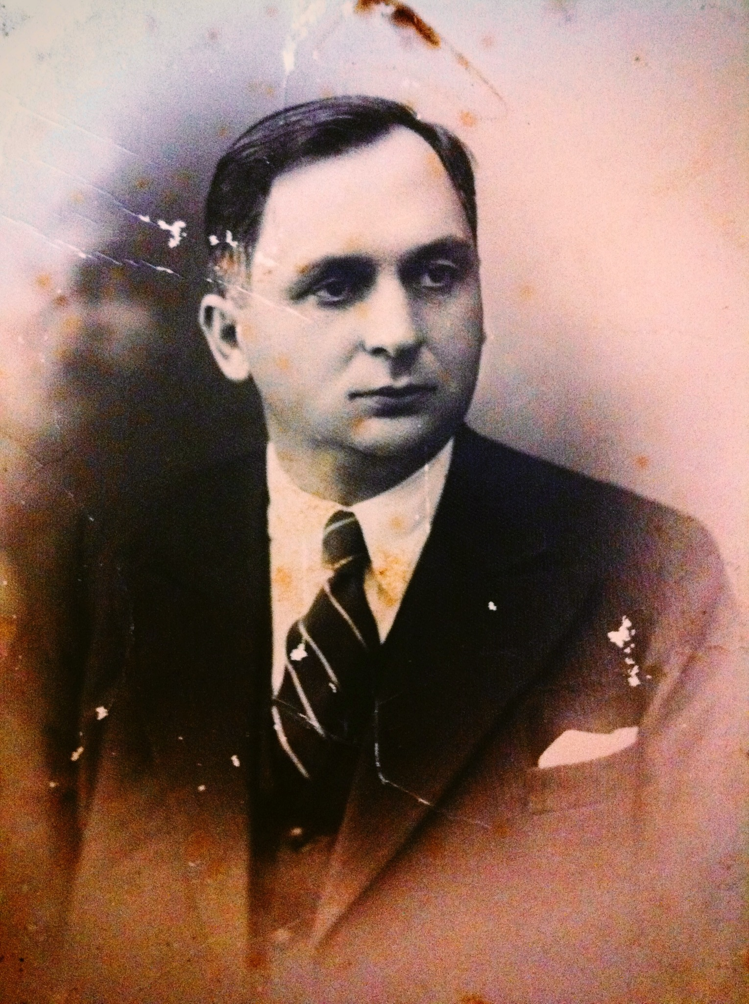 Shefqet Stringa